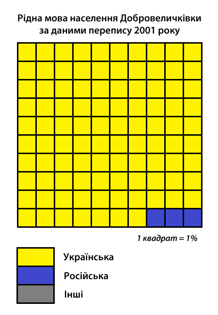 Інфографіка розподілу населення смт Добровеличківка за рідною мовою згідно з даними перепису 2001 року. Джерело: Розподіл населення Кіровоградської області за рідною мовою (у % до загальної чисельності населення) за переписом 2001 року